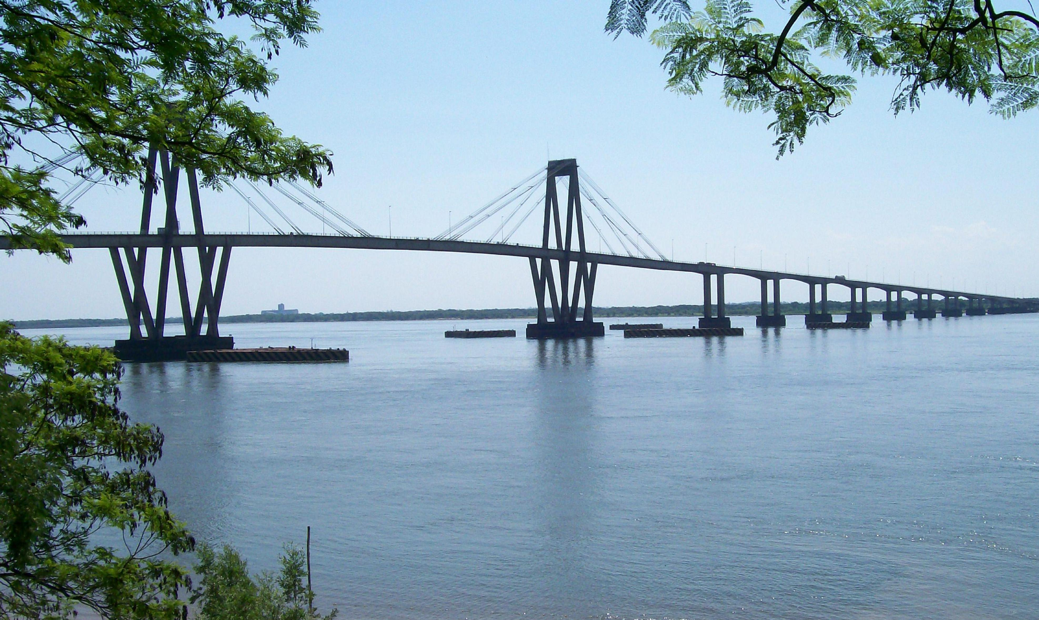 Corrientes